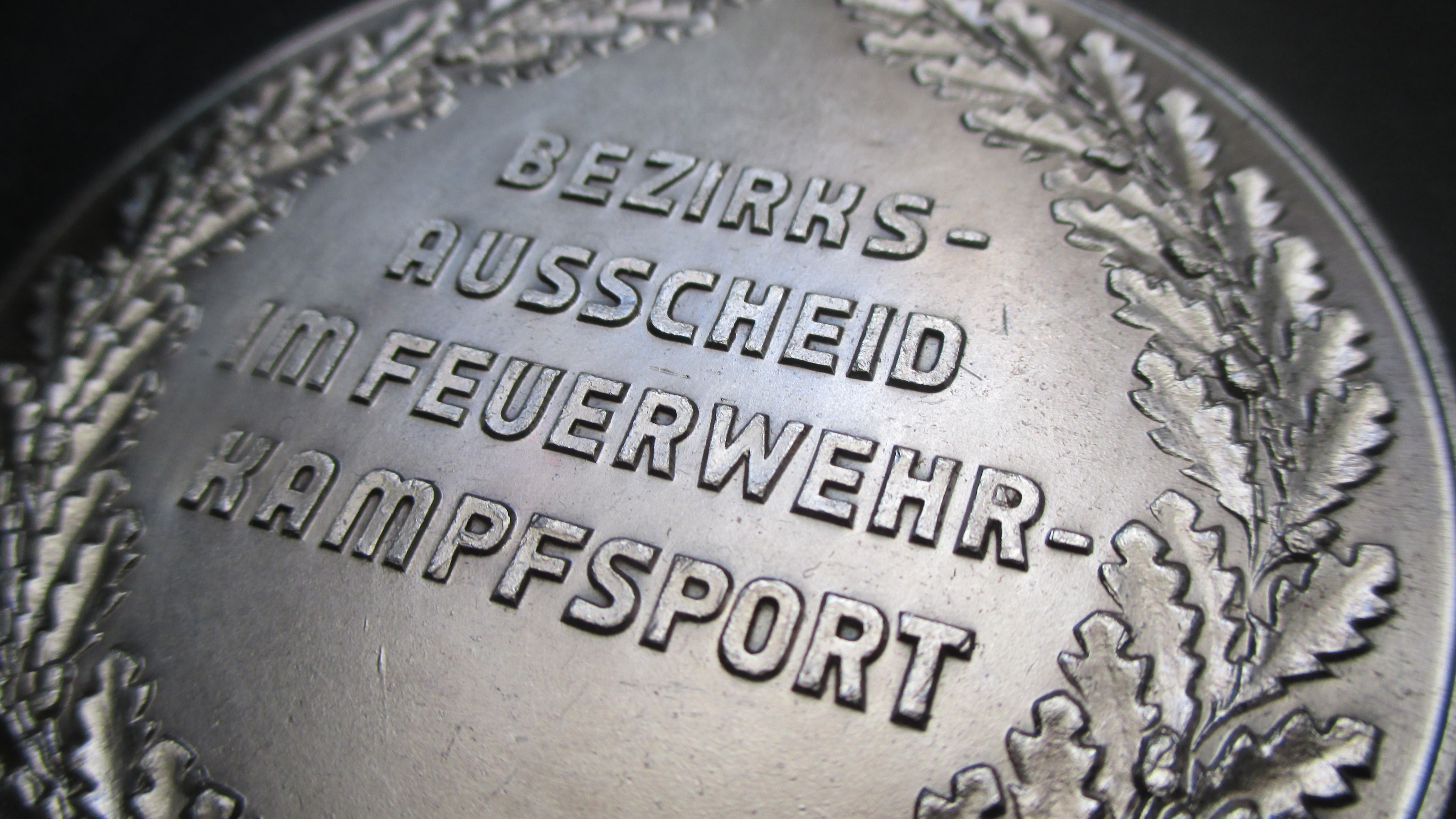 Ehrengabe für hochgestellte Persönlichkeiten - Medaille - Dem Sieger der Feuerwehrstafette (DDR) - Ausführung ohne Henkel/Öse